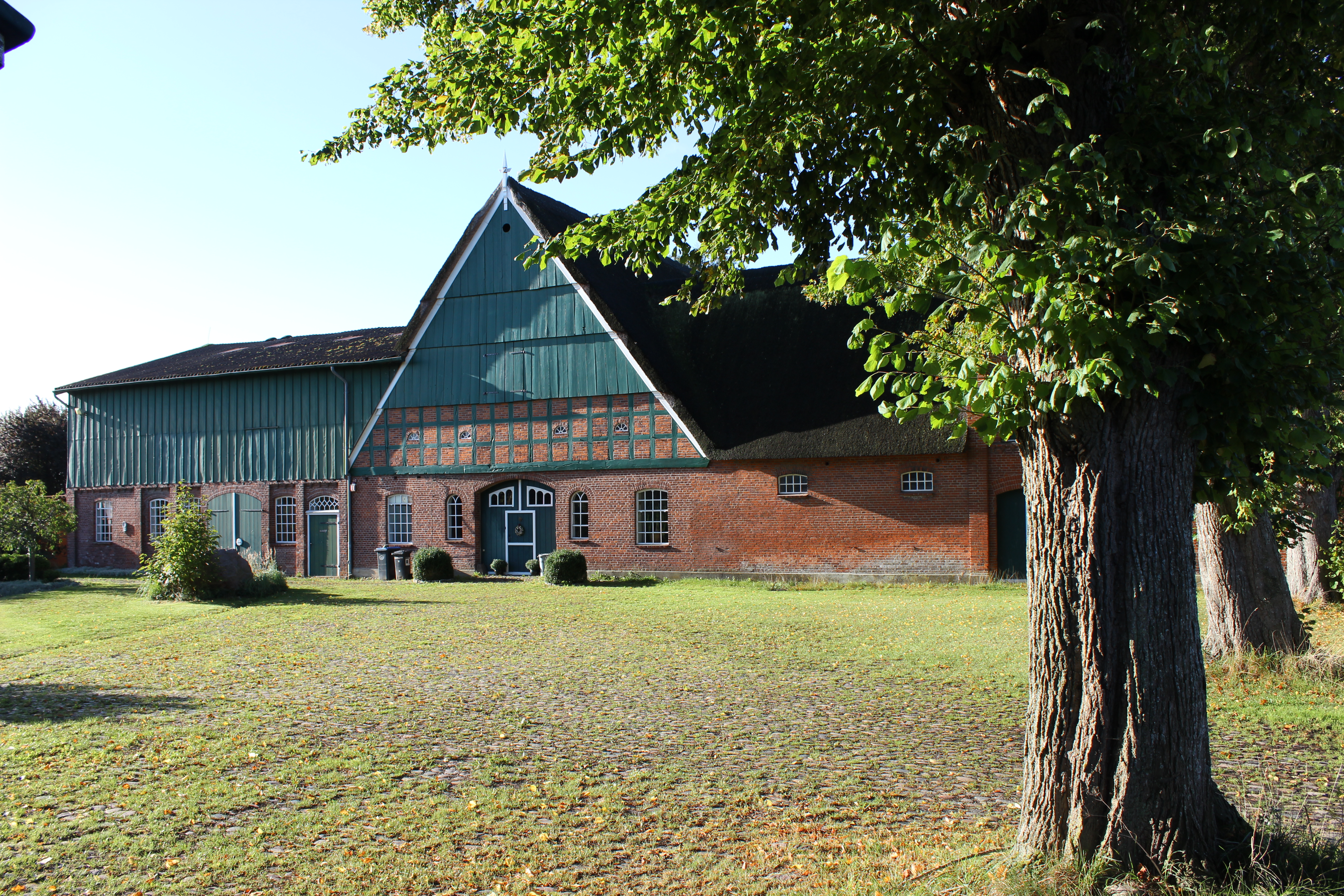 Schleswig-Holstein, Sören, Alte Dorfstrasse 25, Bordesholmer Haus